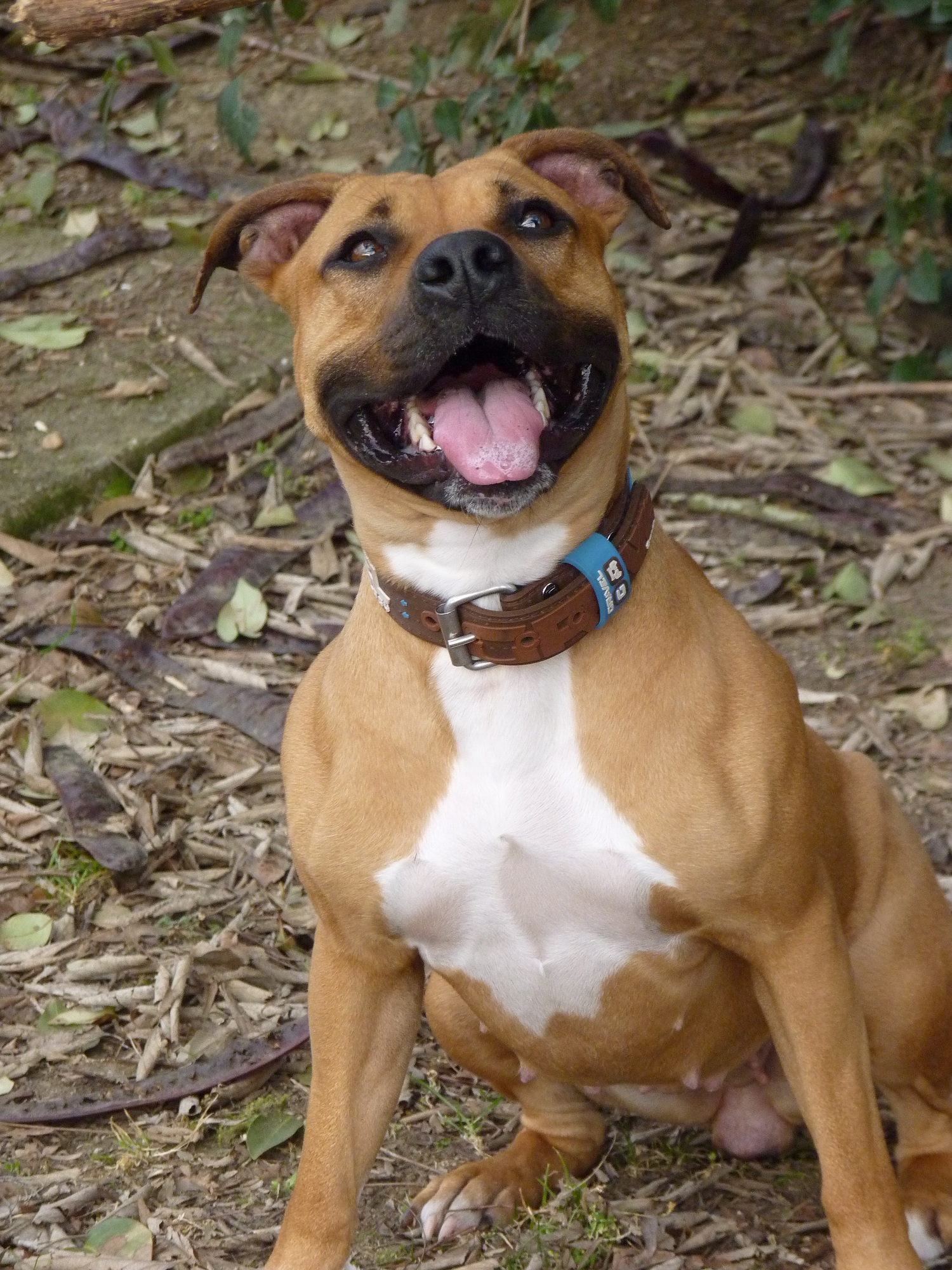 Farah chienne de deux ans